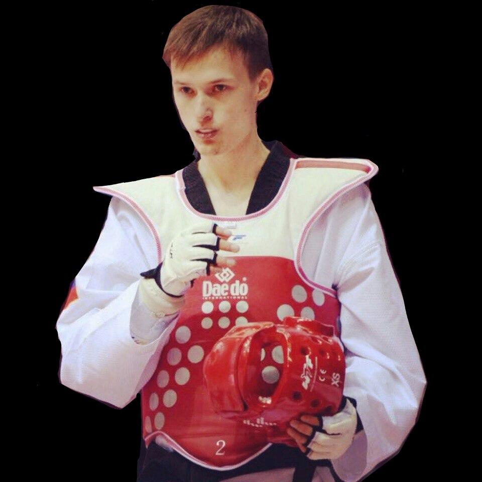 Чемпионат Мира 2015